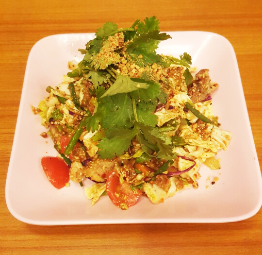 조선말: 태국음식 얌까이양이다